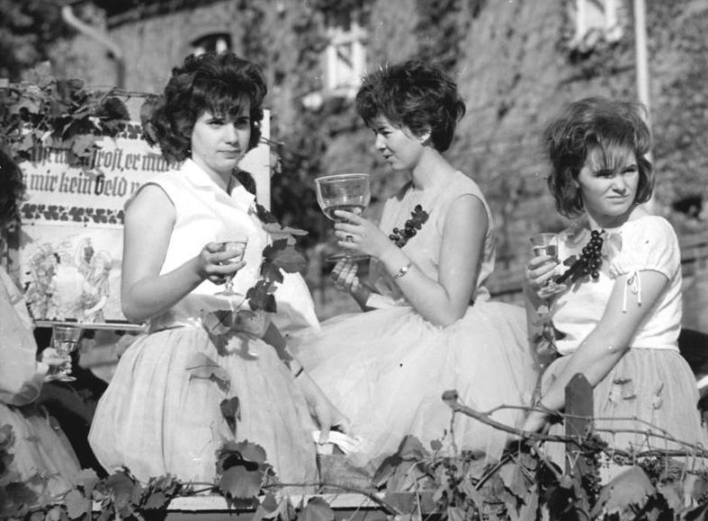 Höhnstedt, Weinkönigin, Dorffestspiele Zentralbild Schaar 7.10.1963 Dorffestspiele in Höhnstedt. Die Einwohner von Höhnstedt feierten am Vorabnd des 14. Jahrestages der Republik mit einen Festumzug, fröhlichem Winzertanz in zwei Sälen, kulturellen Darbietungen und einem Fußballspiel ausgelassen den zweiten Tag ihrer Dorffestspiele 1963. Ganz Höhnstedt war im Sonntagsstaat auf den Beinen, als sich am Nachmittag der bunte Festumzug durch die winkligen Straßen bewegte. UBz: Nach alter Tradition thronte auf einem der ersten Wagen die von den Winzern des Ortes ausgewählte Weinkönigin 1963. Eva-Maria Truog, der diese Ehre zuteil wurde, zählt erst 16 Jahre und ist ansonsten Oberschülerin. (Mitte)